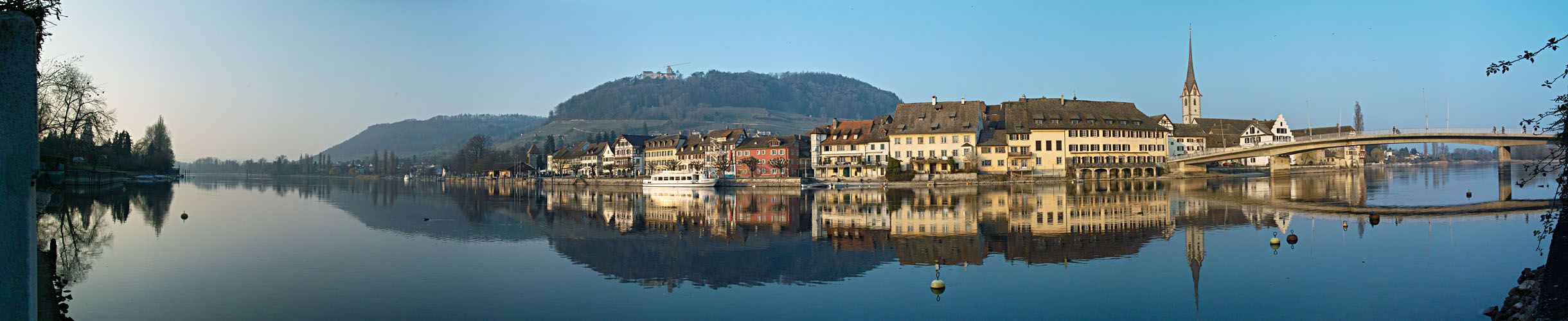 Wide panorama of Stein am Rhein, Switzerland